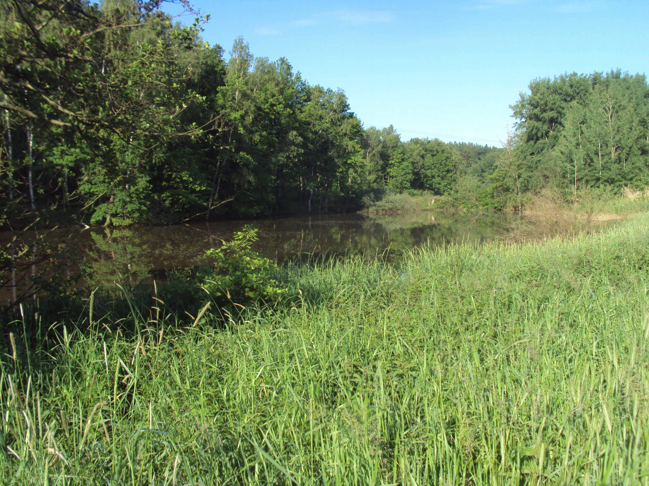 Horní Cihelenský rybník, součást PP Cihelenské rybníky